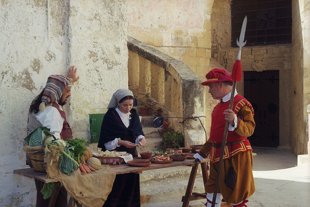 St. Elmo Fort, Malta. Historyczne sceny rodzajowe na terenie fortu, zdjecie Marek Silarski, maj 2005